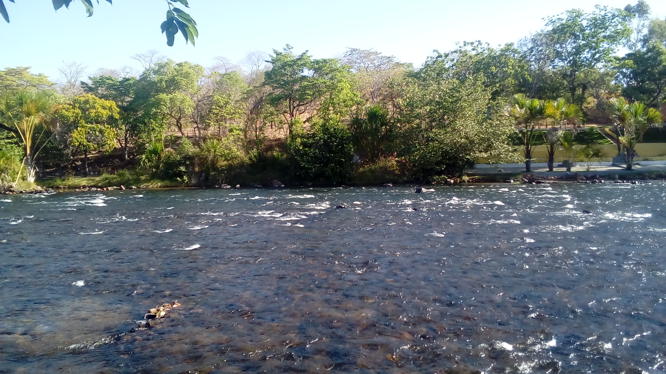 Rio de ondas para refrescar o calor de 40º C de Barreiras.